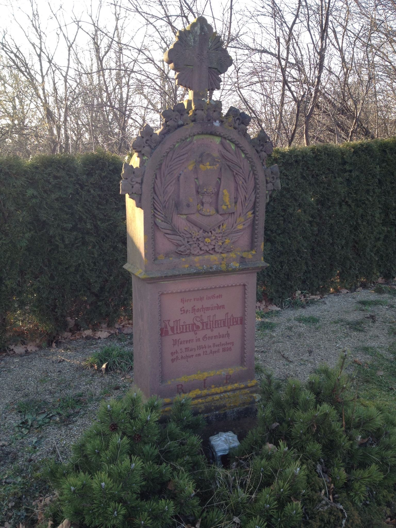 Friedhof in Grombach, Grabmal des Ortspfarrers Albin Schlachter